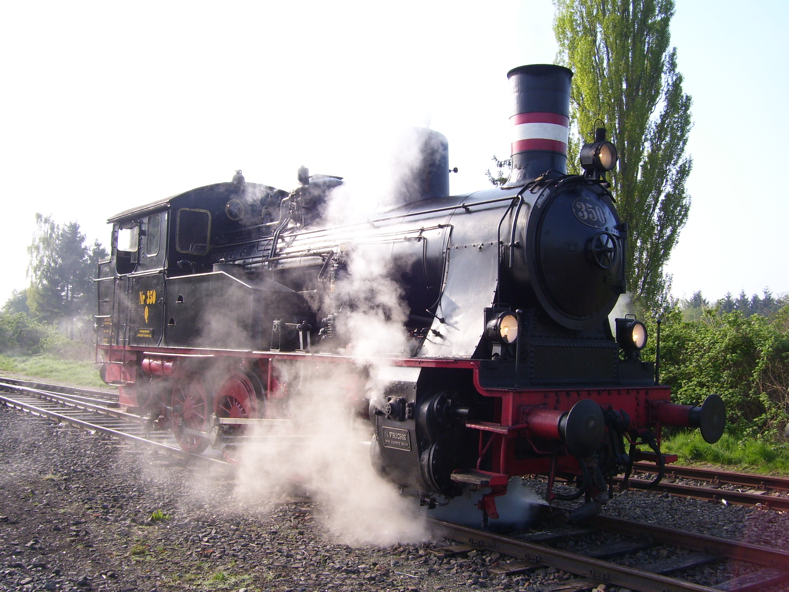 Dampflok Q350 (ex DSB) der Arge Geesthachter Eisenbahn